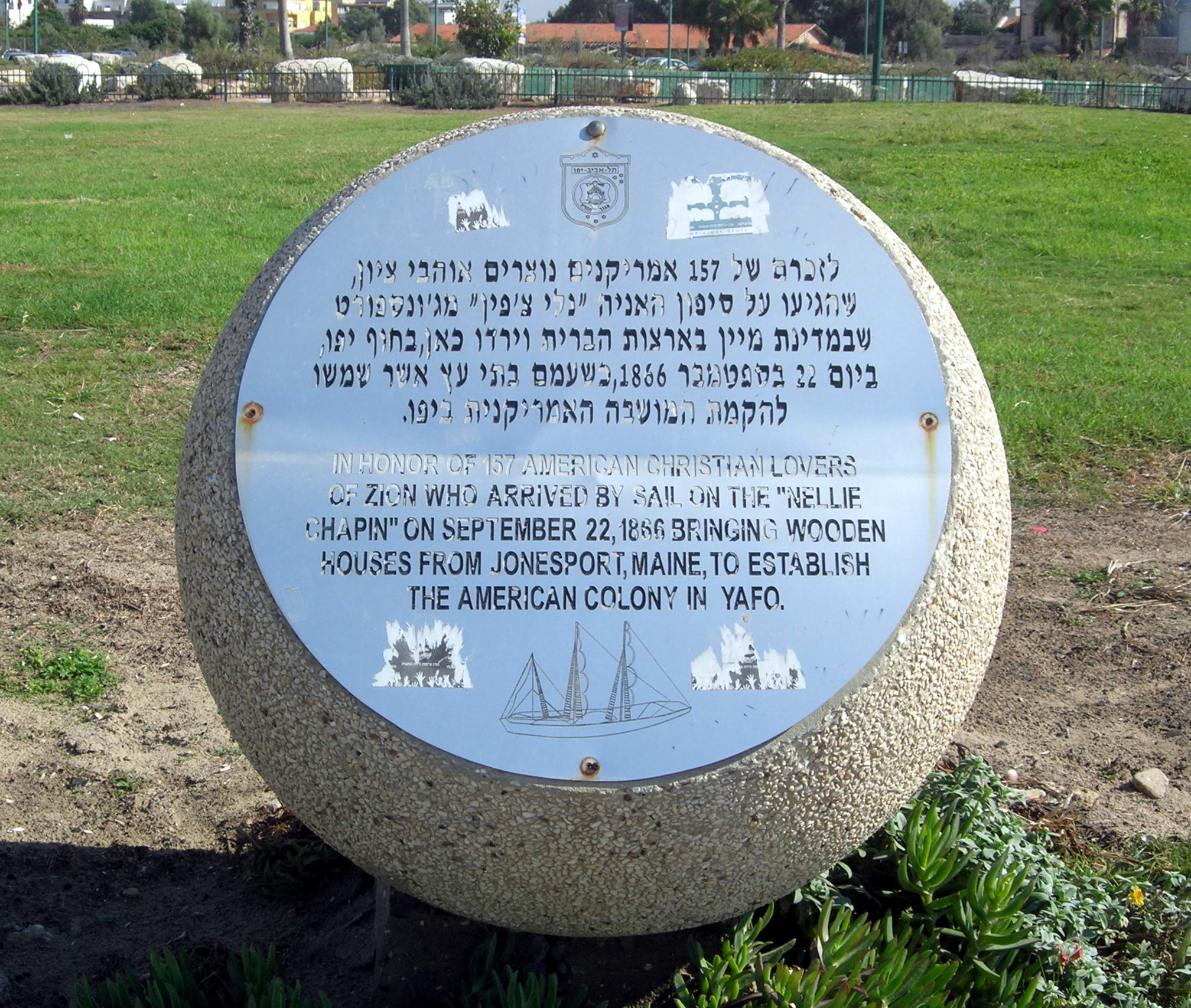 Commémoration de l'arrivée d'un navire américain apportant des maisons en bois à Tel Aviv-Jaffa. Source =Photo taken by Remi Jouan Date =Octobre 2006 Author =Remi Jouan